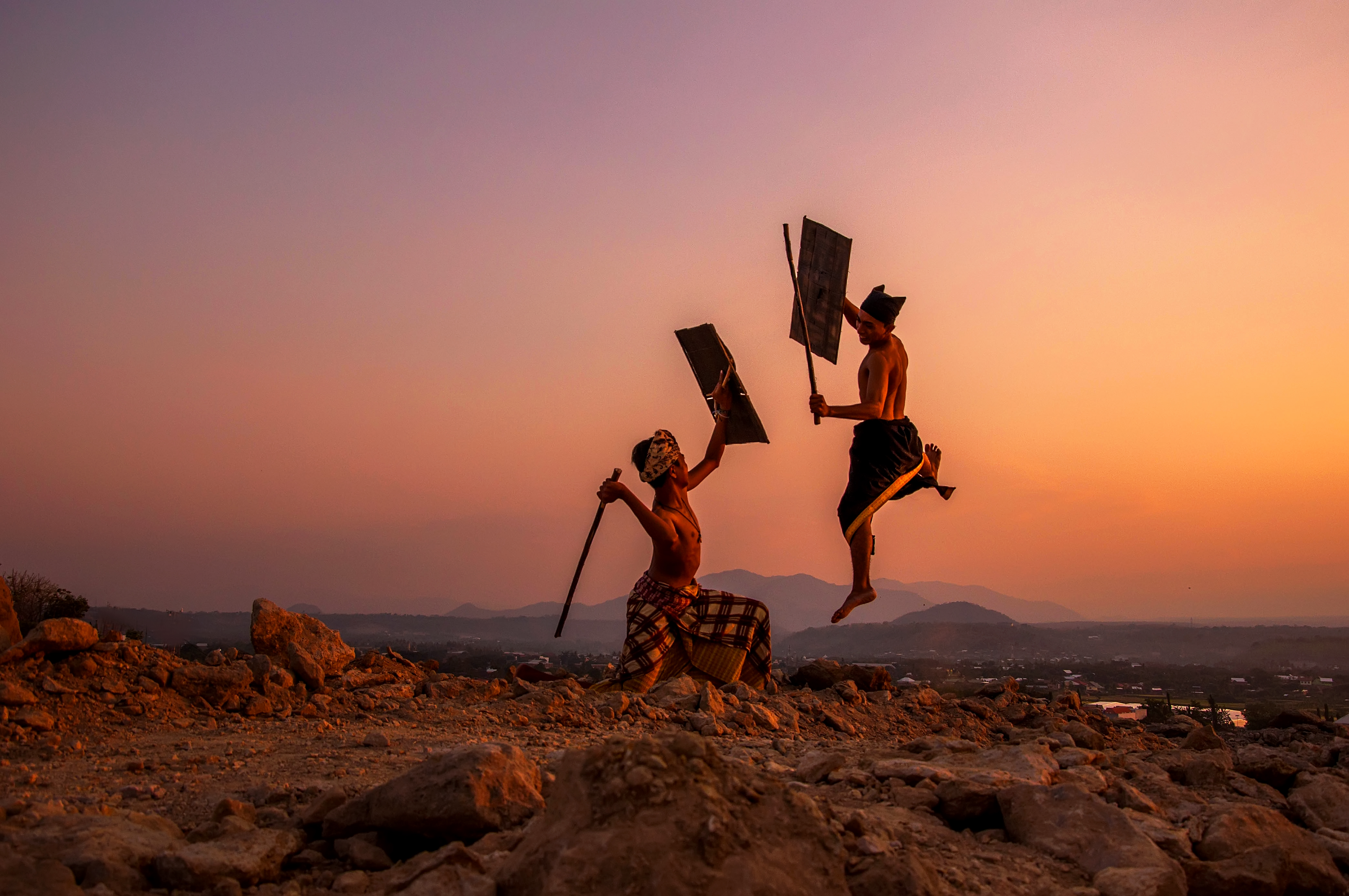 Peresean adalah pertarungan antara dua lelaki yang bersenjatakan tongkat rotan (penjalin) dan berperisai kulit kerbau yang tebal dan keras (perisai disebut ende). Tradisi ini dilakukan oleh masyarakat suku Sasak, Lombok, Nusa Tenggara Barat, Indonesia.